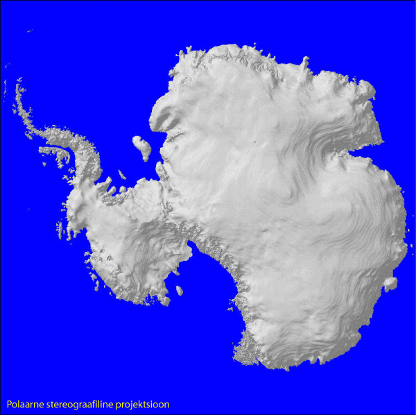 Antarktise reljeef šelfiliustiketa. Kaart põhineb USGS-i GTOPO30 digitaalsel kõrgusmudelil.